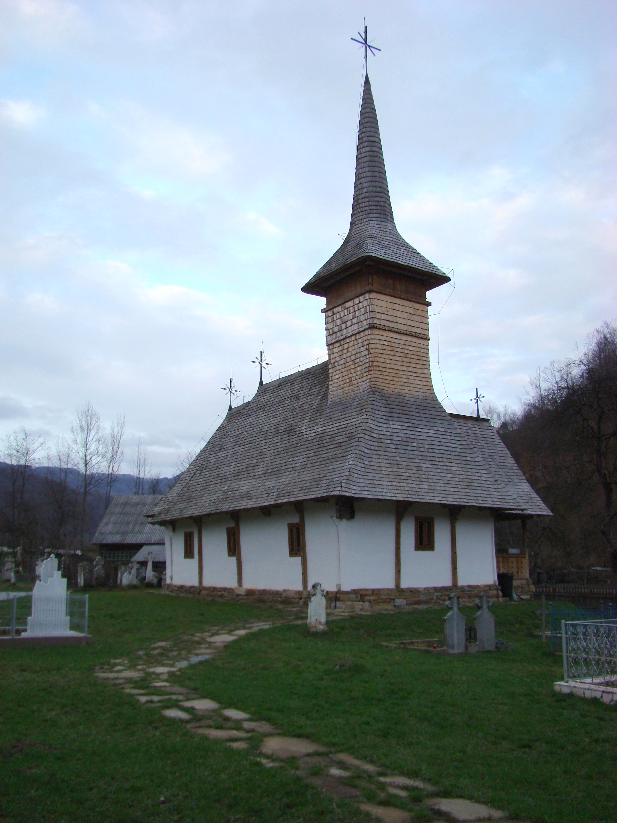 Biserica de lemn „Adormirea Maicii Domnului”,sat STĂNIJA; comuna BUCEŞ